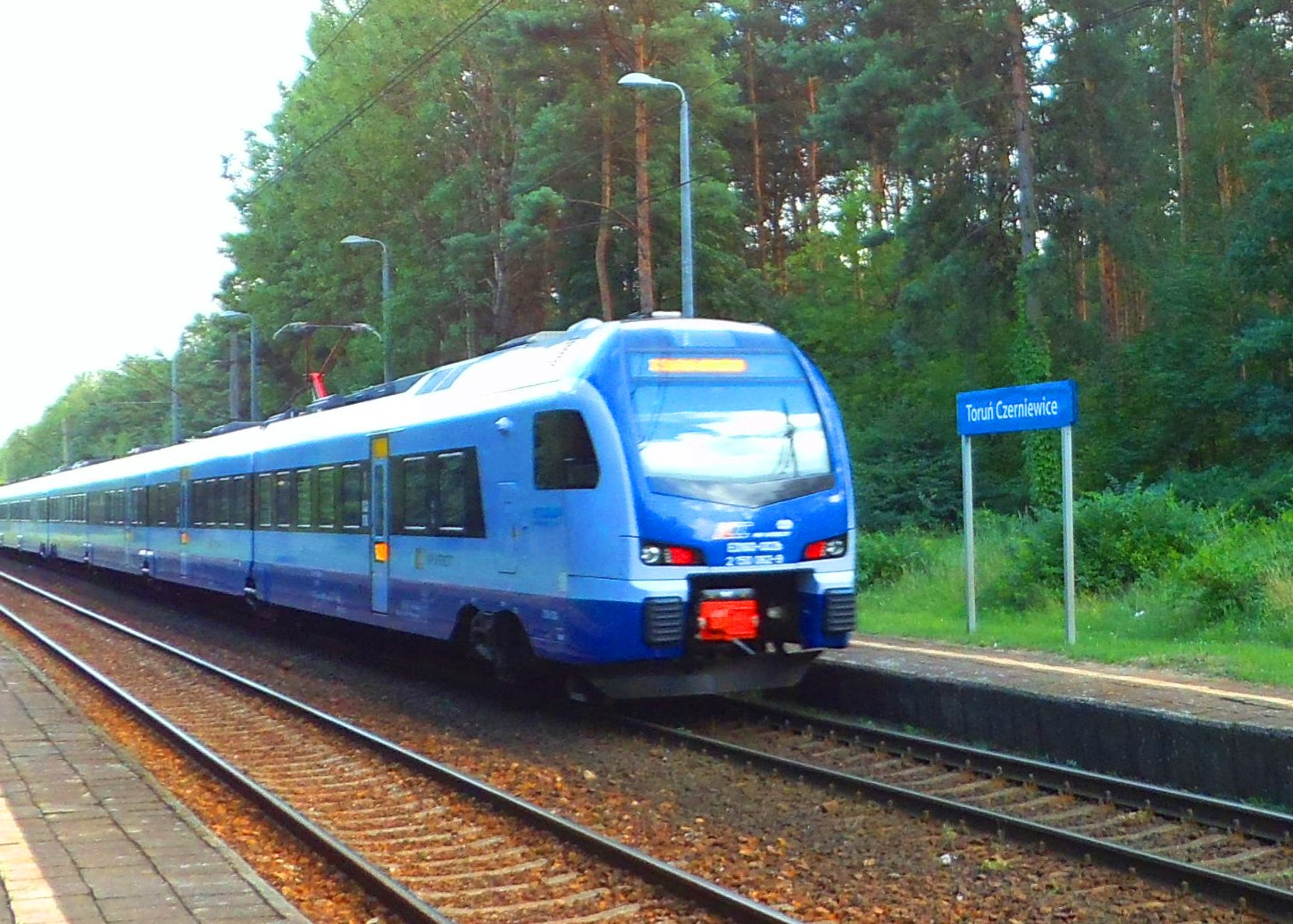 Linia kolejowa numer 18 w Toruniu